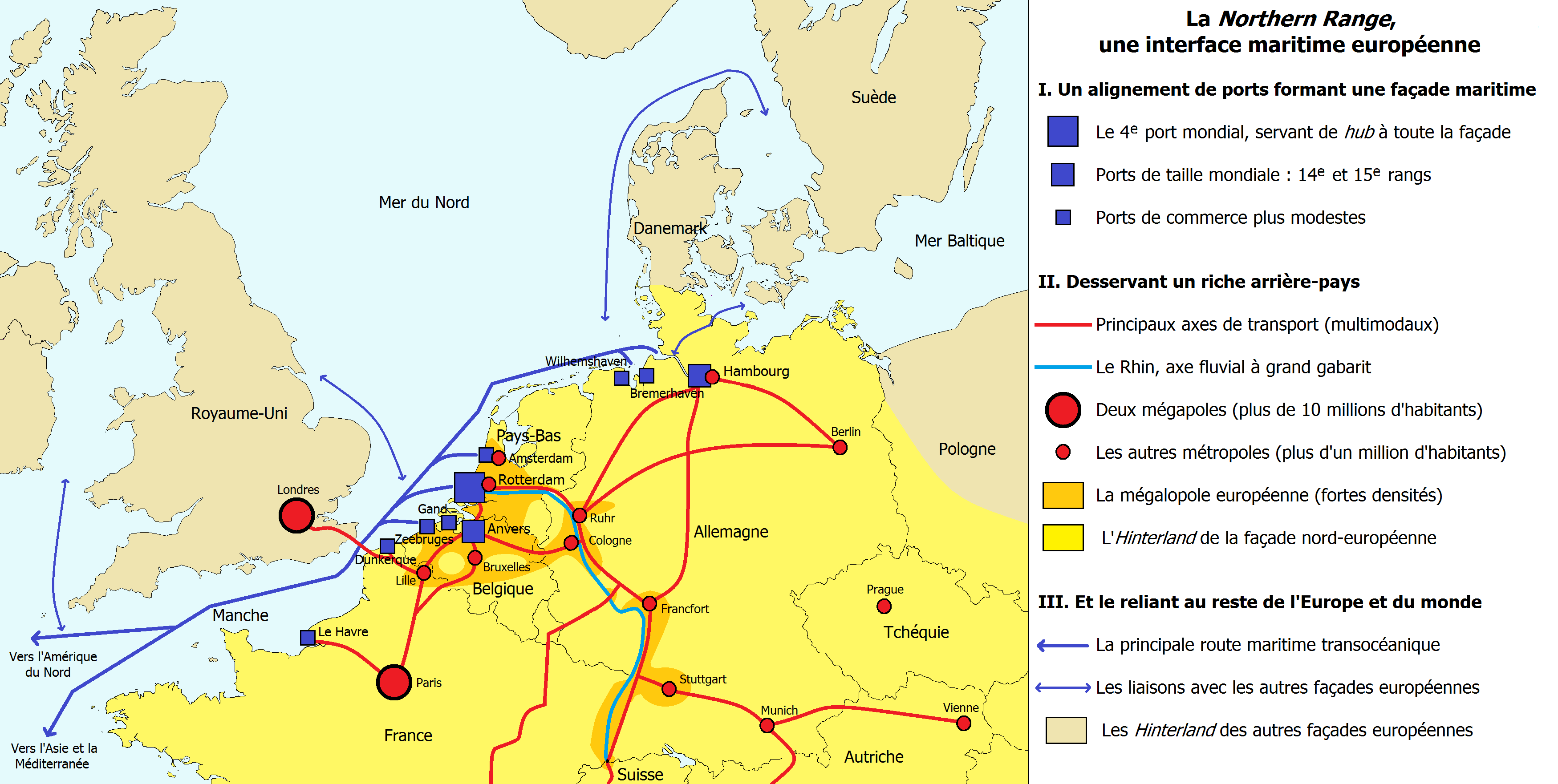 Réalisation d'un croquis (exercice scolaire) sur les ports de la rangée nord-européenne, étape 7 (finale).